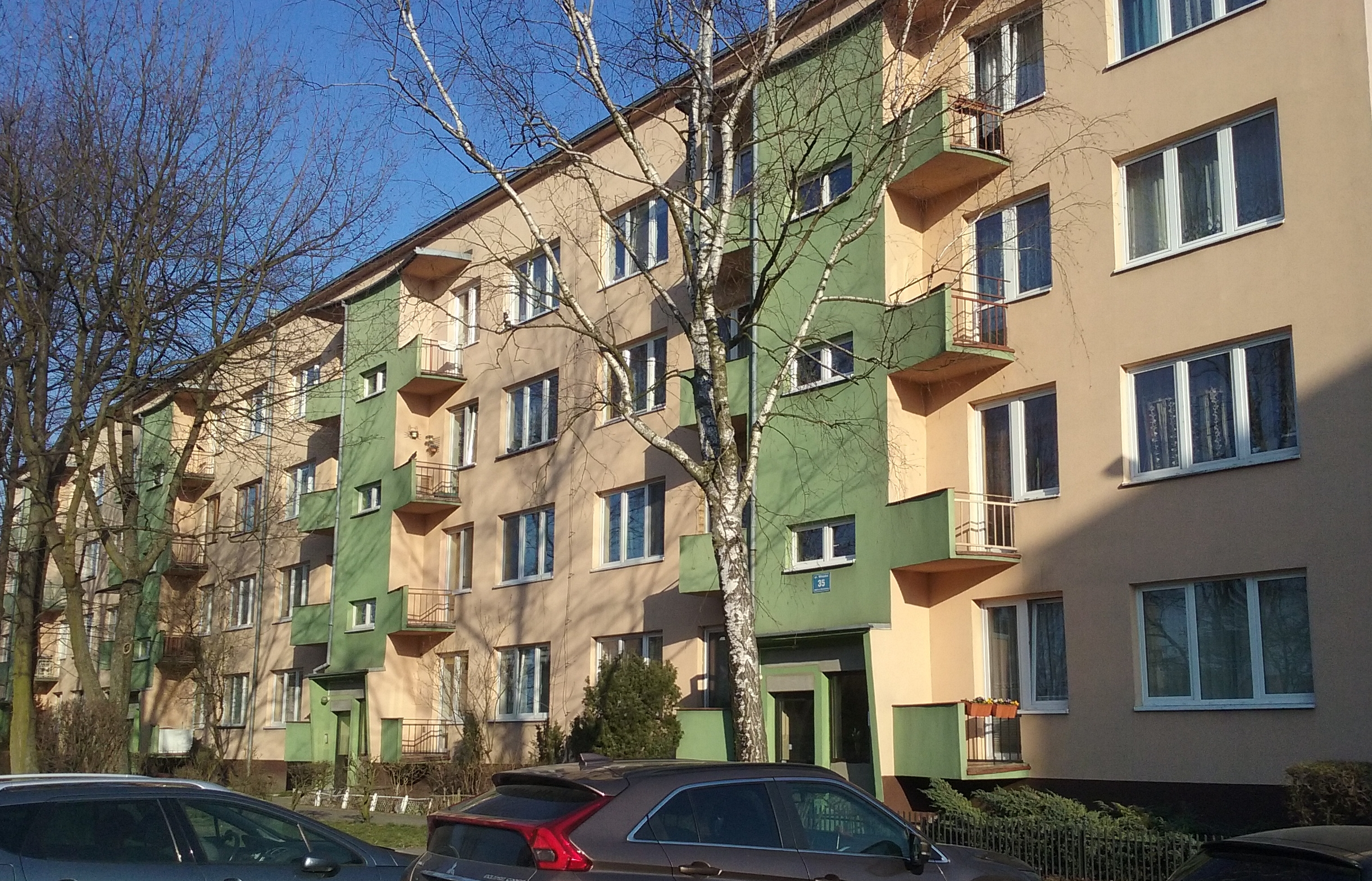 Wiejska 35 w Tomaszowie Mazowieckim, jeden z bloków mieszkalnych wybudowanych przez zakłady chemiczne Wistom (przedwojenna Tomaszowska Fabryka Sztucznego Jedwabiu zał. 1911)